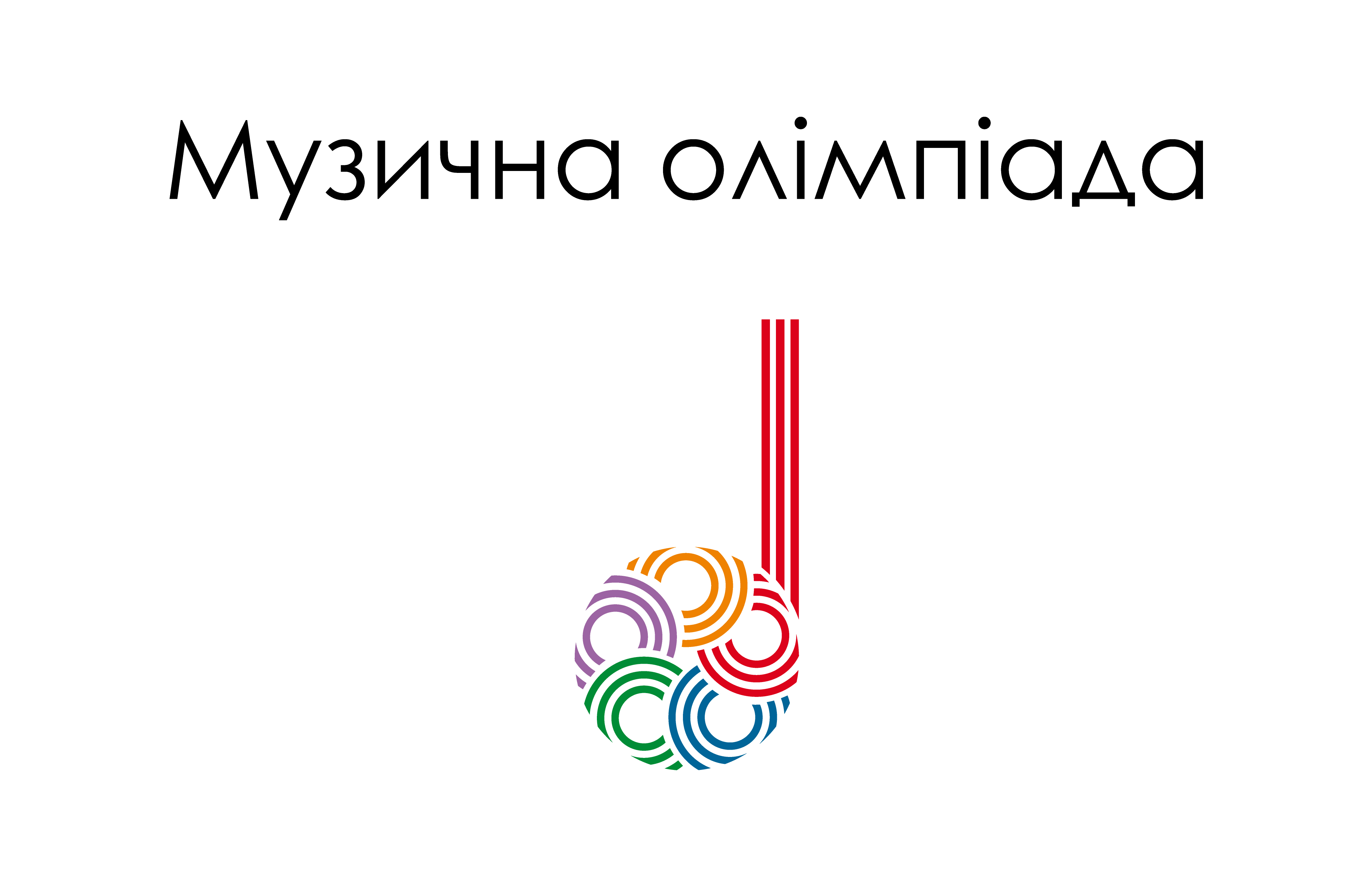 Всеукраїнська музична олімпіада